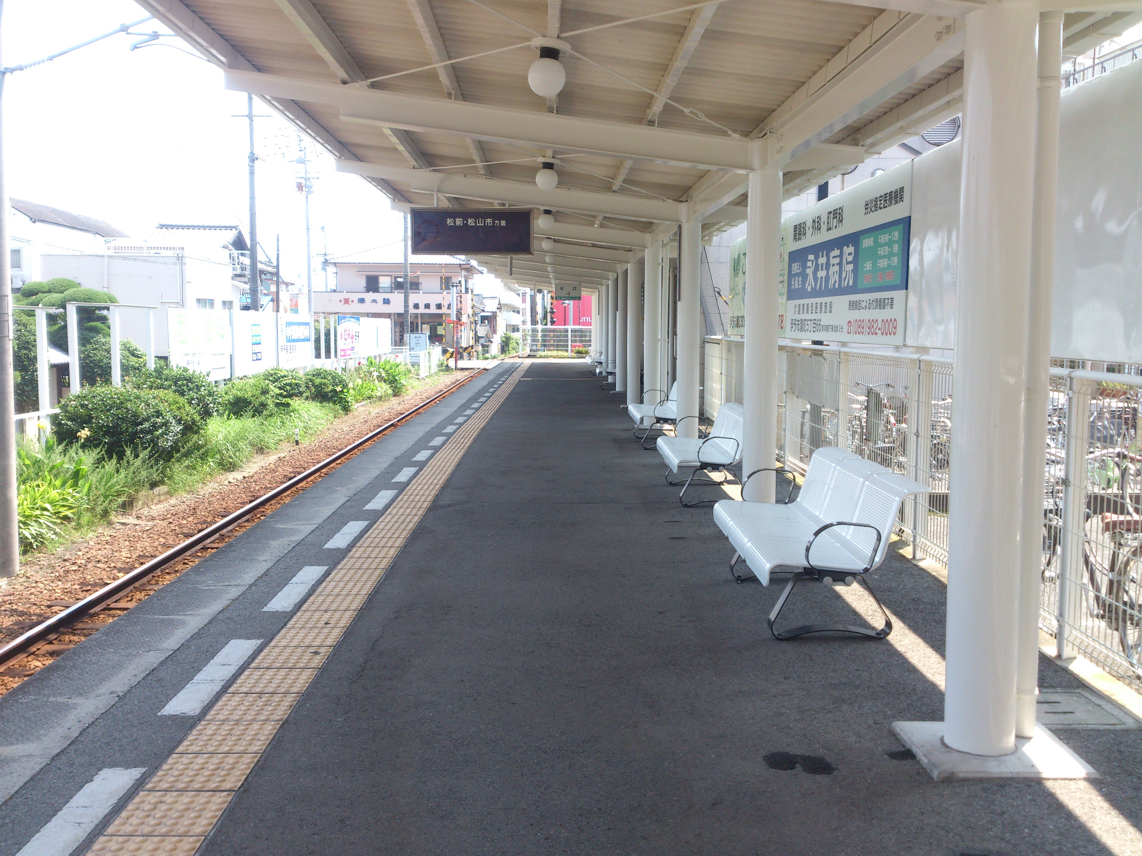 伊予鉄道 郡中駅のホームです。